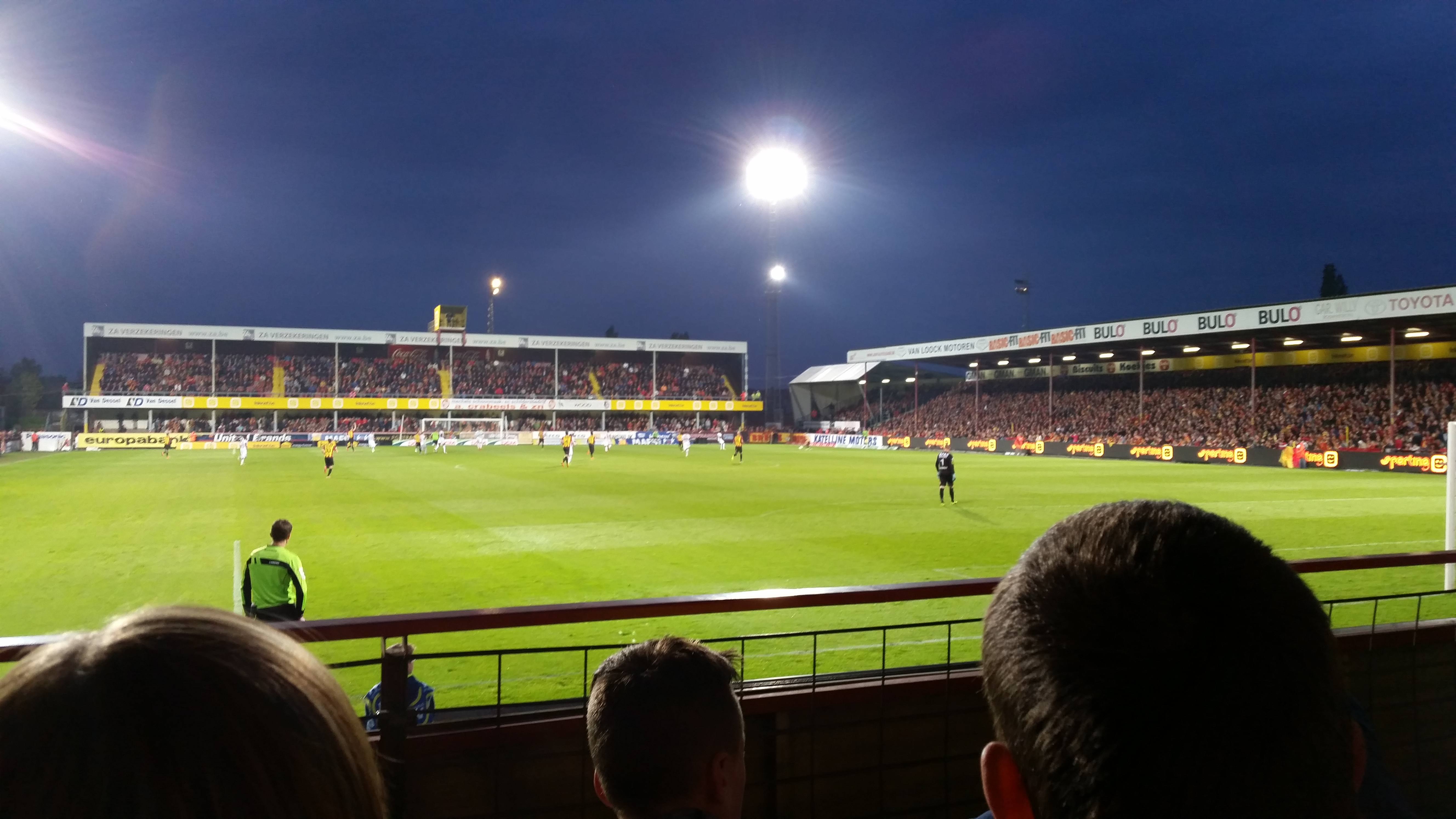 Stadion KV Mechelen: Achter De Kazerne